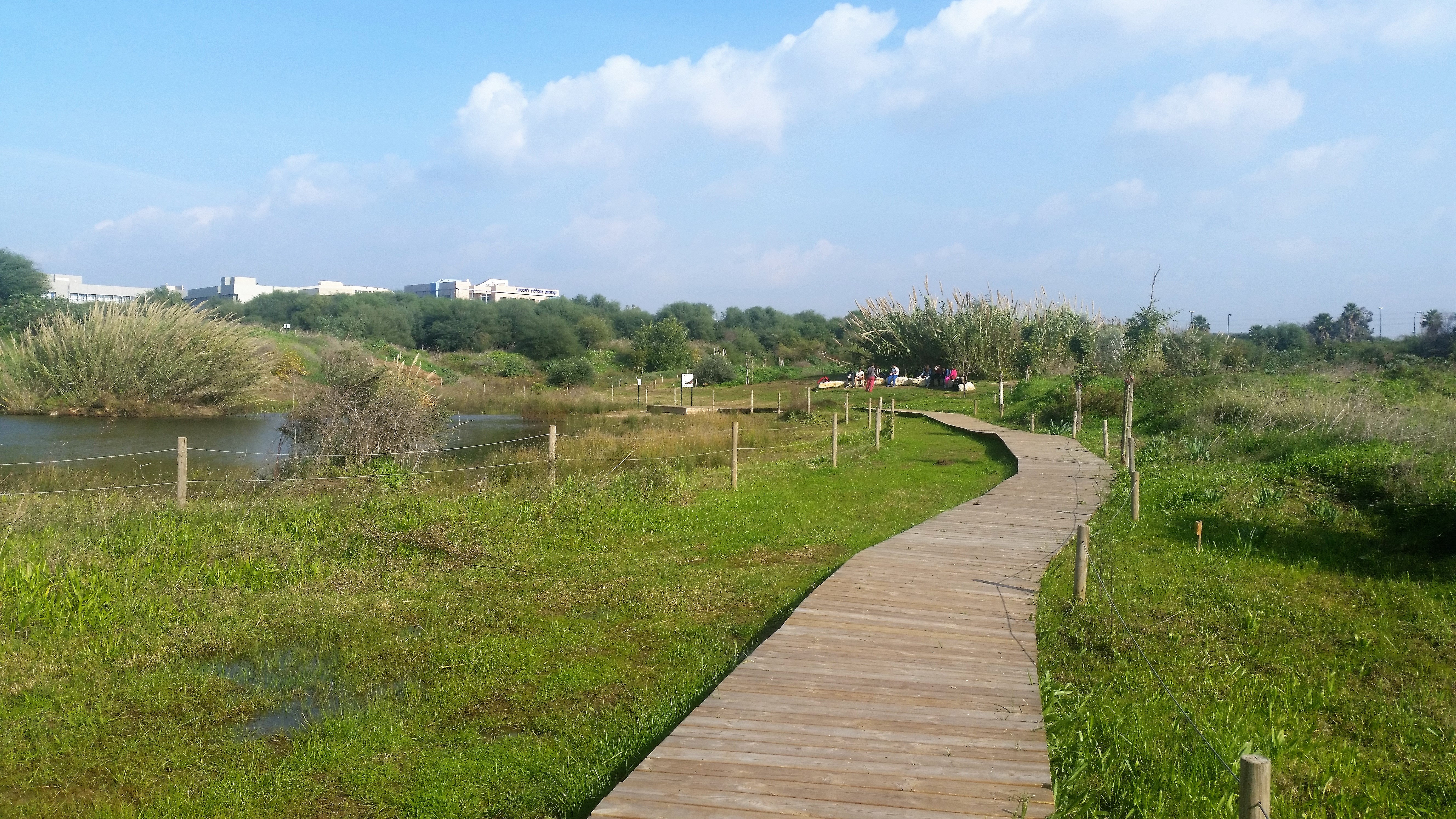 בריכת נאמן, קבוצת תלמידים בפעילות, בחזית שביל מוגבה המאפשר נגישות גם שהשטח מוצף